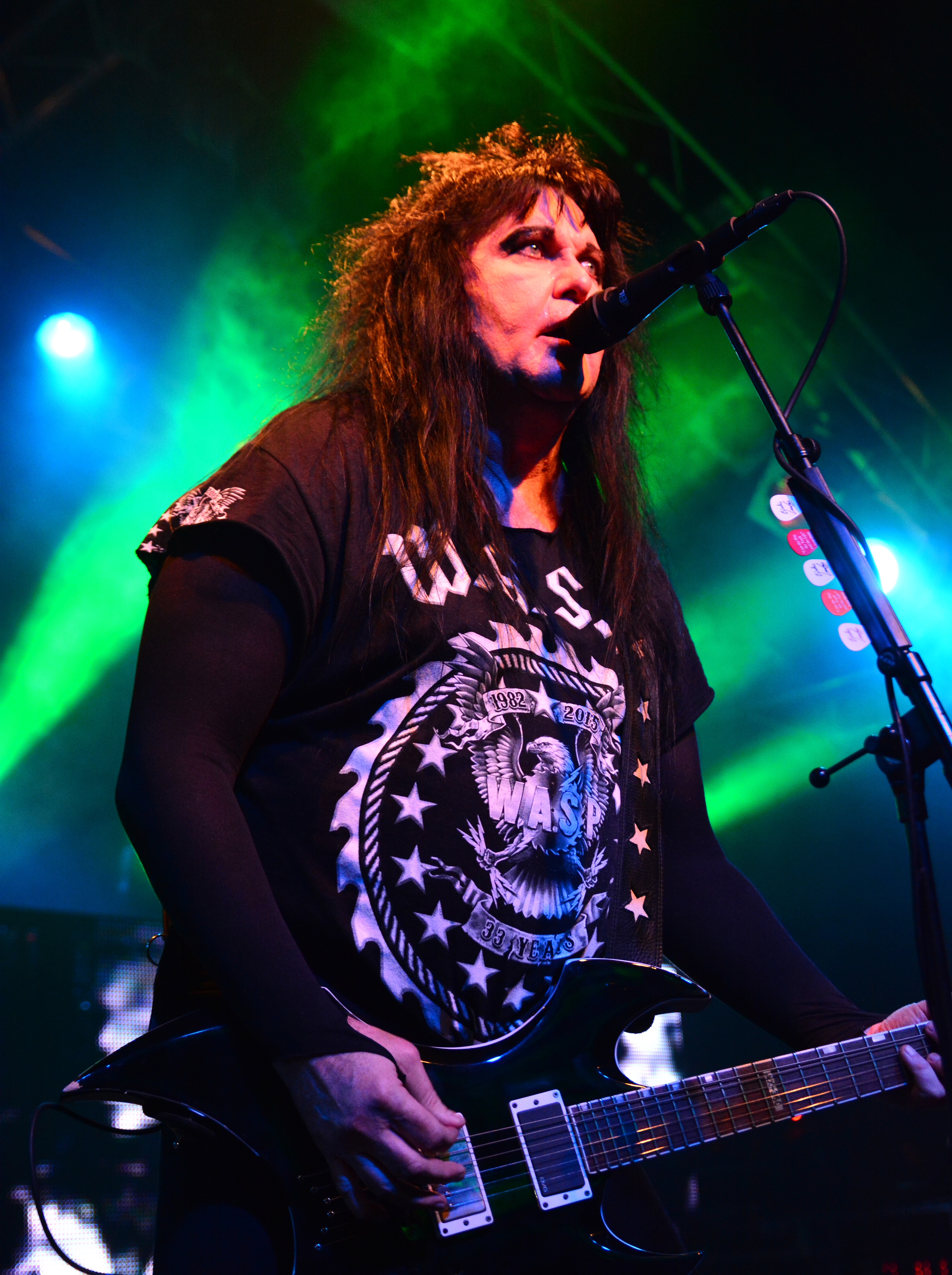 W.A.S.P. bei den Hamburg Metal Dayz 2015